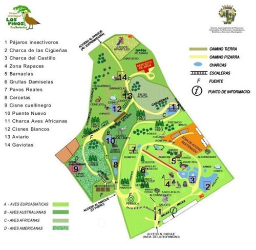 Mapa del Parque de los Pinos (Plasencia)